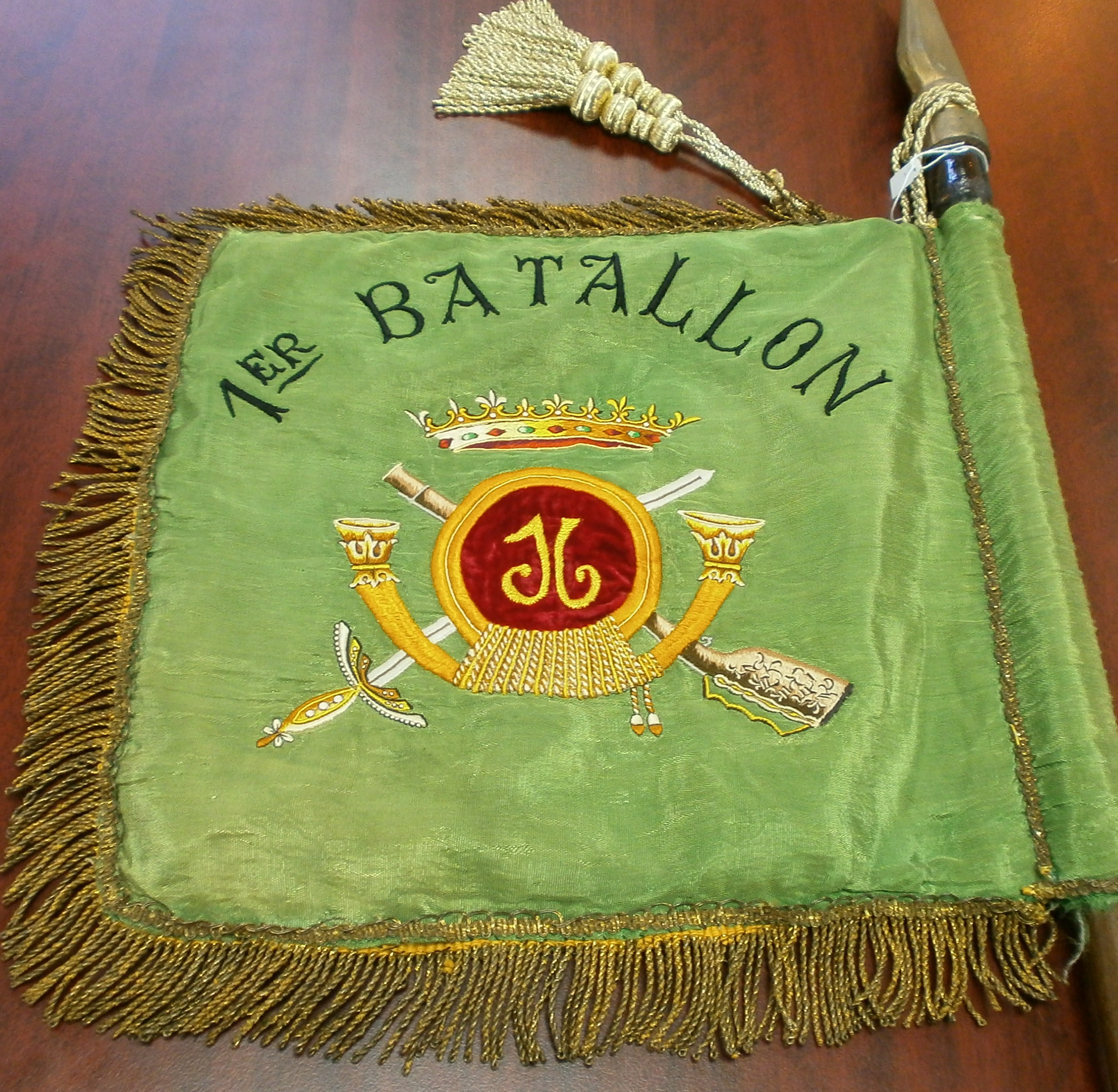 Banderín de las tropas del 1º Batallón espedicionario a Sidi Ifni-2